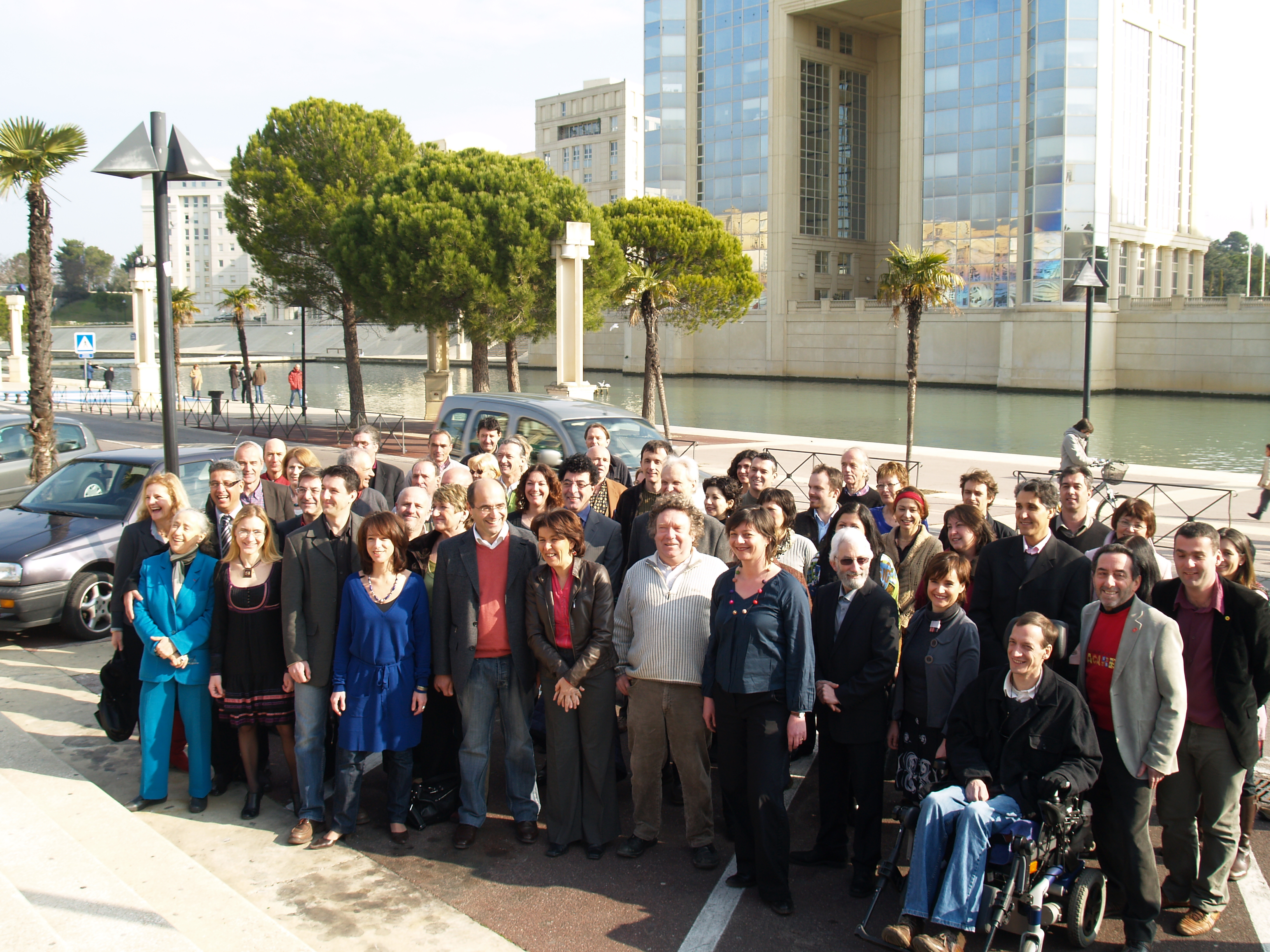 Les candidats d'Europe Ecologie lors d'une rencontre avant les élections régionales françaises de 2010 à Montpellier dans la région Languedoc-Roussilon.